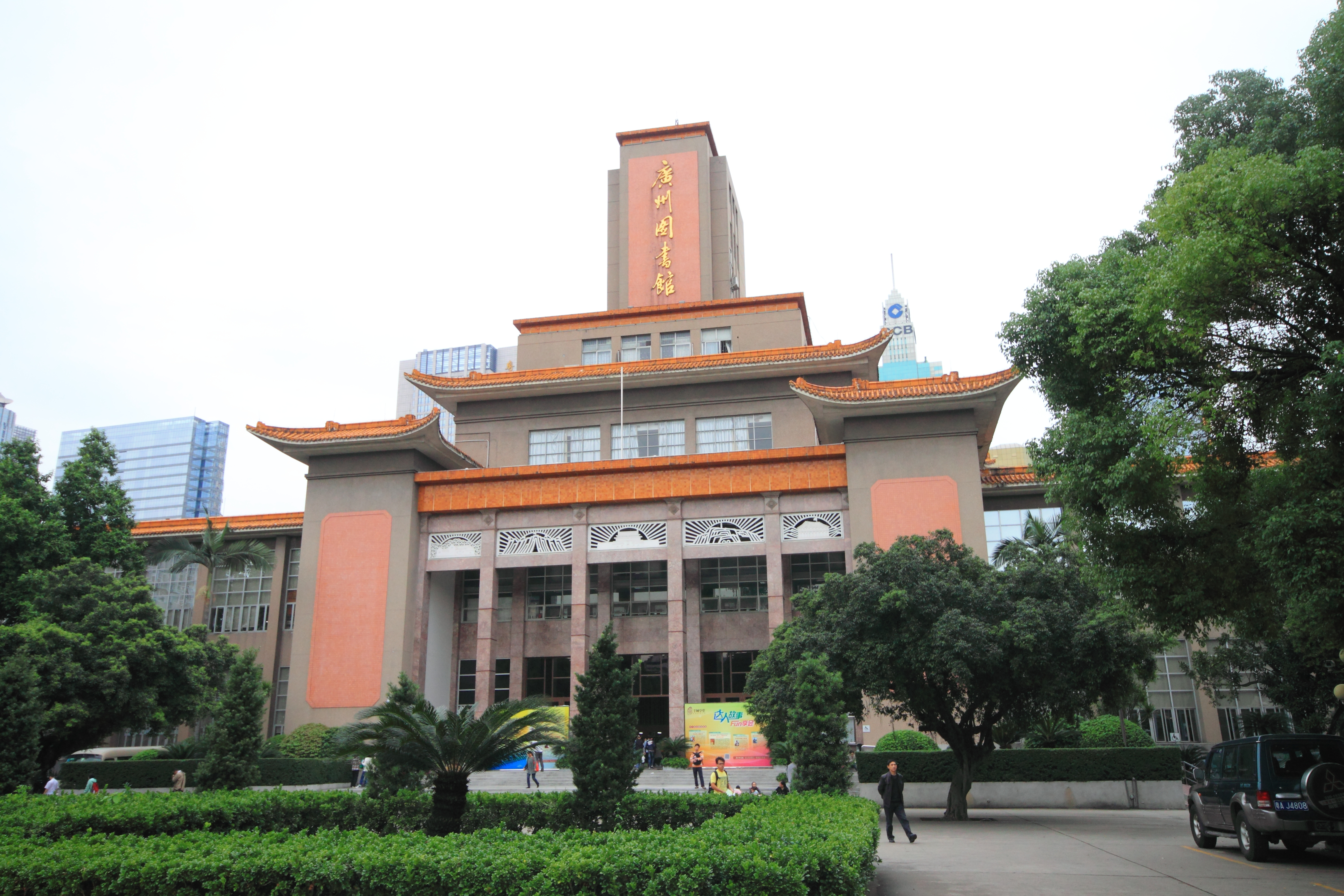 广州图书馆旧馆